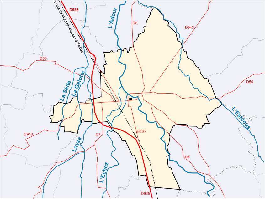 Carte simplfiée de Maubourguet, routes et rivières, commune de Maubourguet, Hautes-Pyrénées, France.